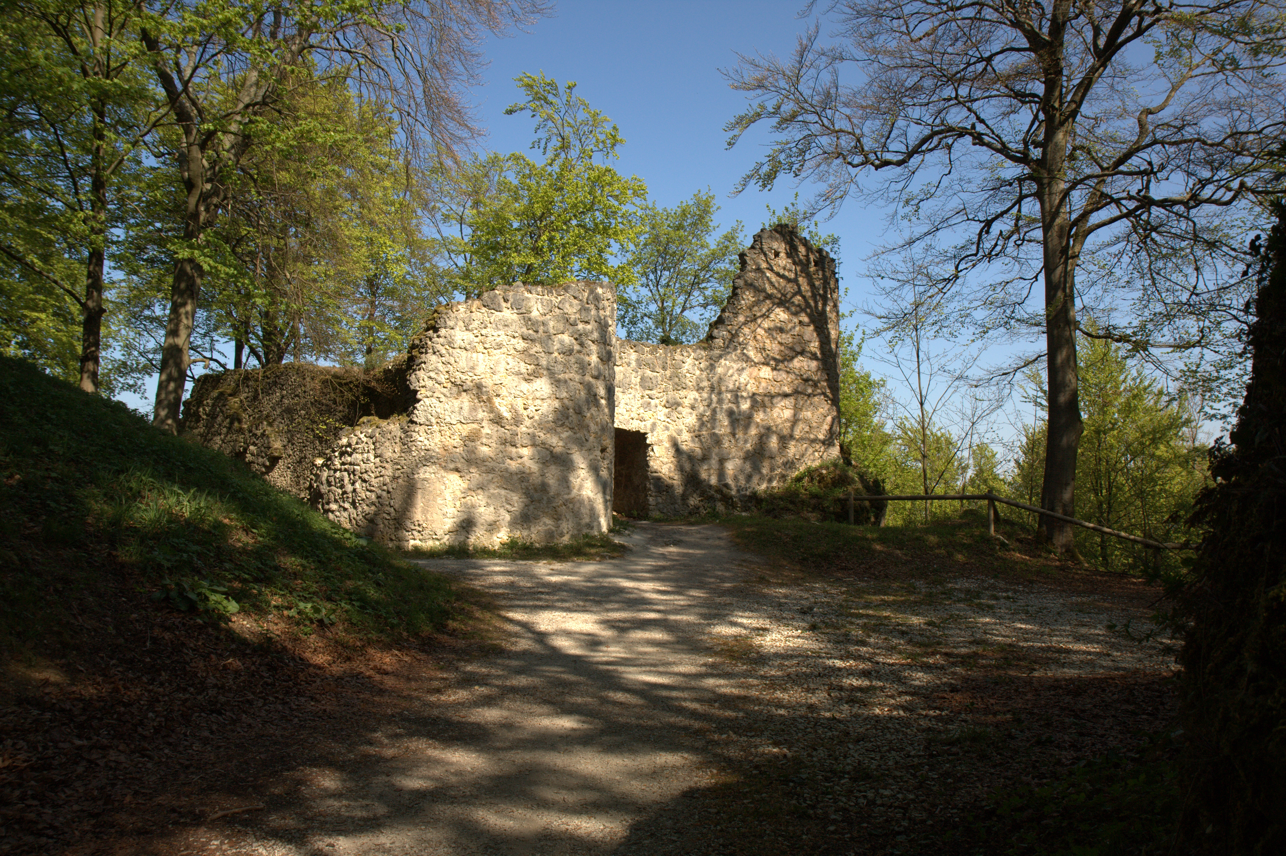 Burgruine Leienfels - Ansicht der Kernburg mit Zugang und einem flankierenden Rundturm